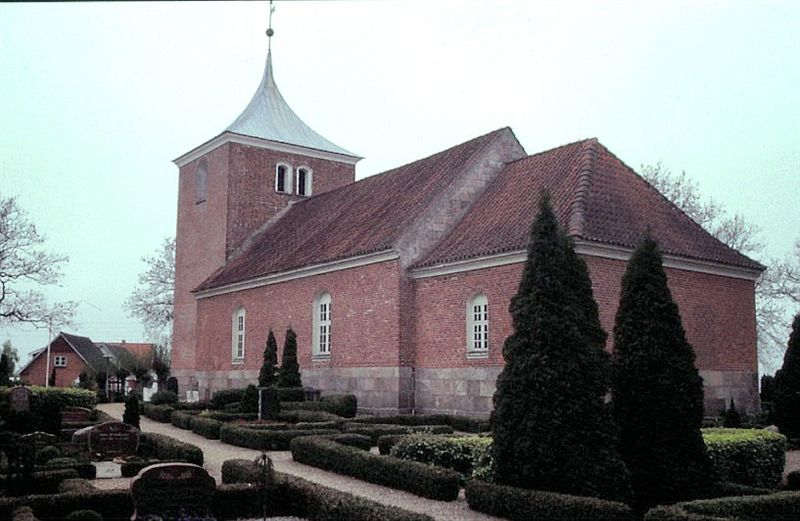 Sjørslev Kirke, set fra sydøst